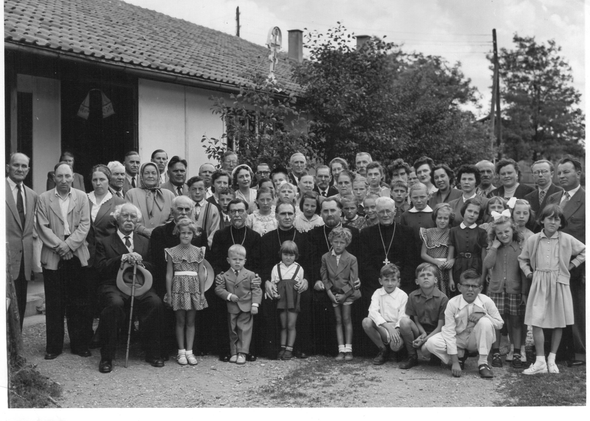 Ukrainisch Orthodoxe St. Petrus und Paulus Gemeinde in München. Foto der Kirchengemeinde aus den 1950er Jahren.